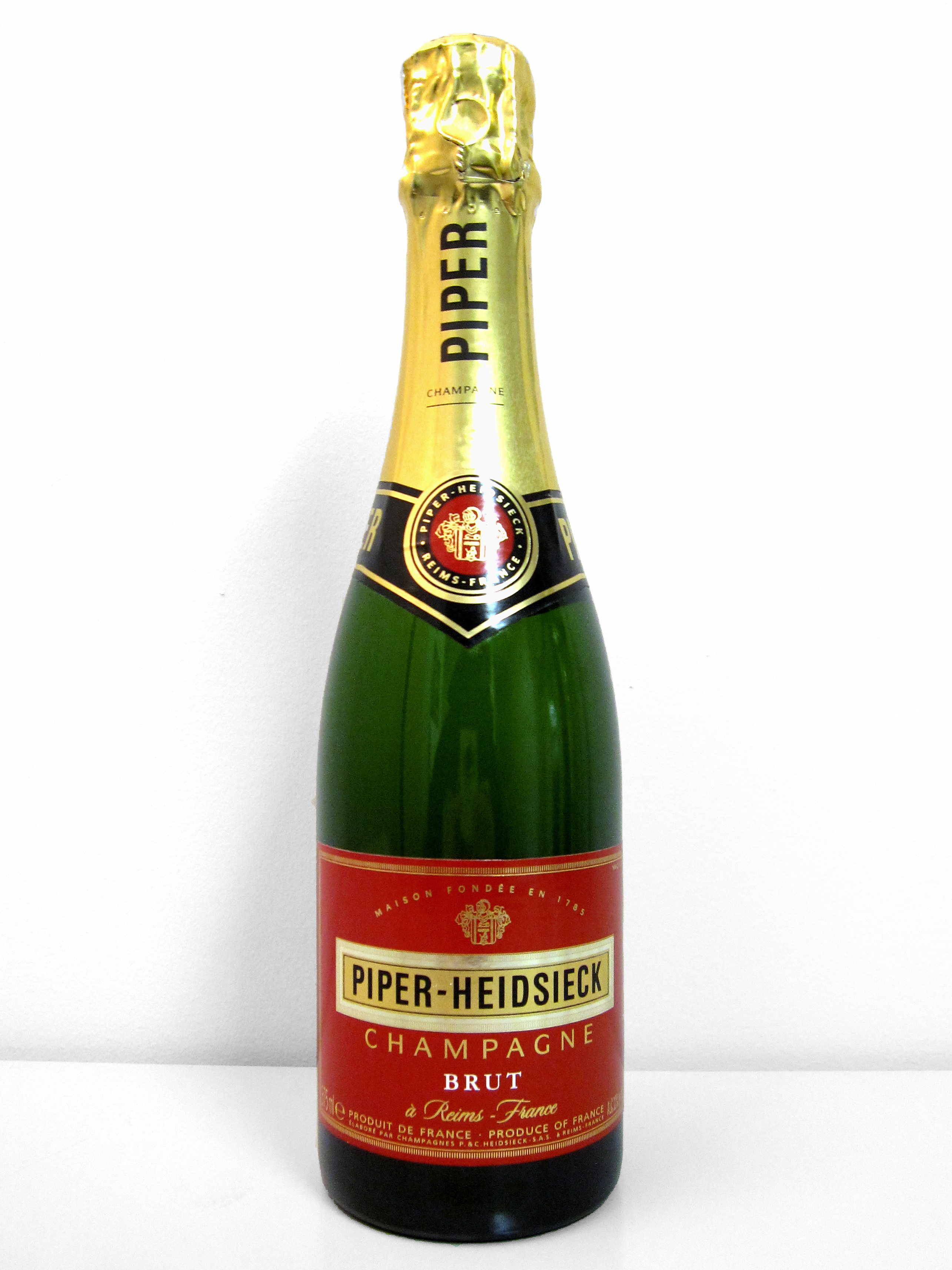 Piper-Heidsieck Champagne Brut